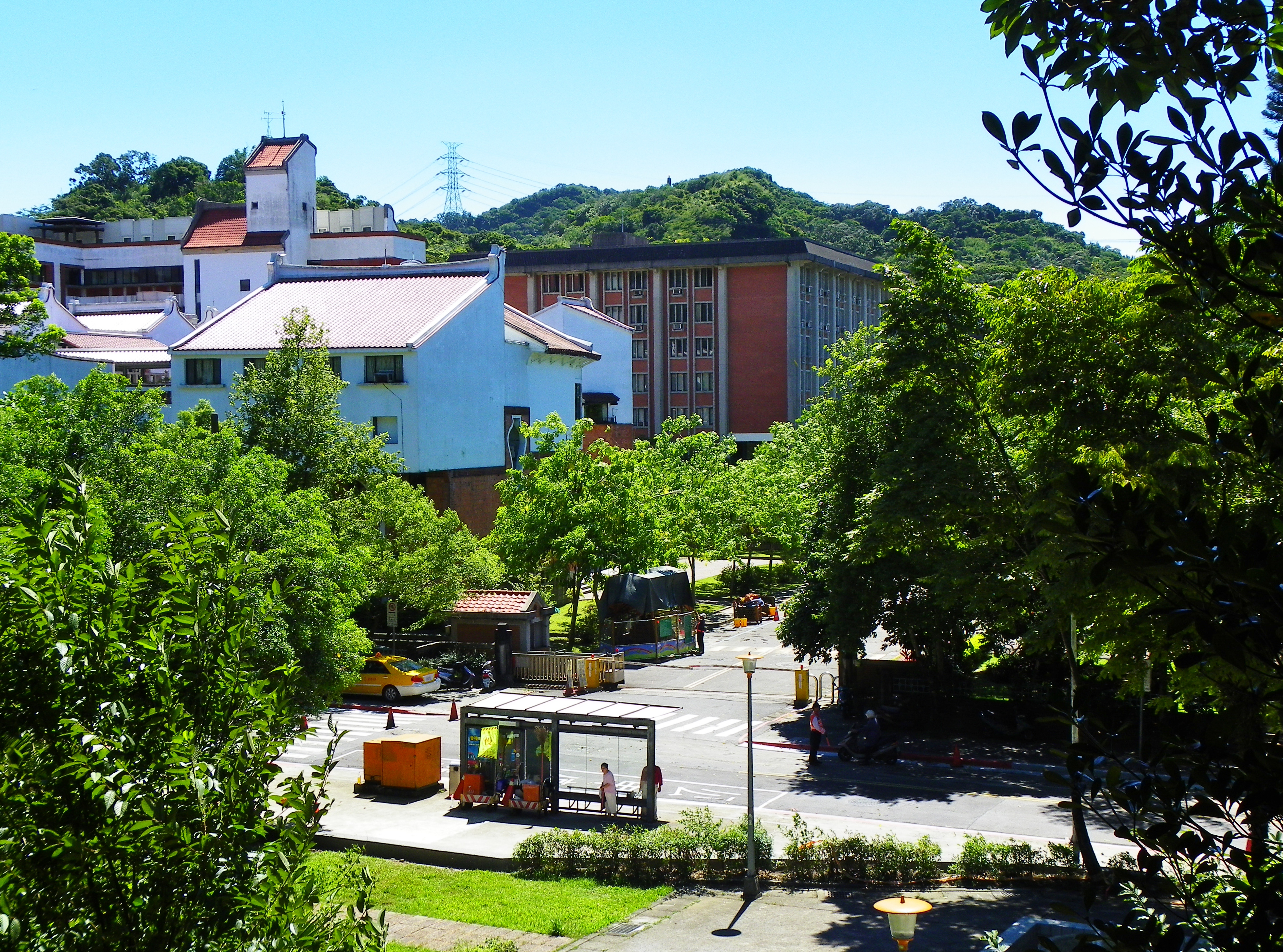 從胡適公園西向遠眺中央研究院民族學研究所與修路交通管制中的研究院路二段。